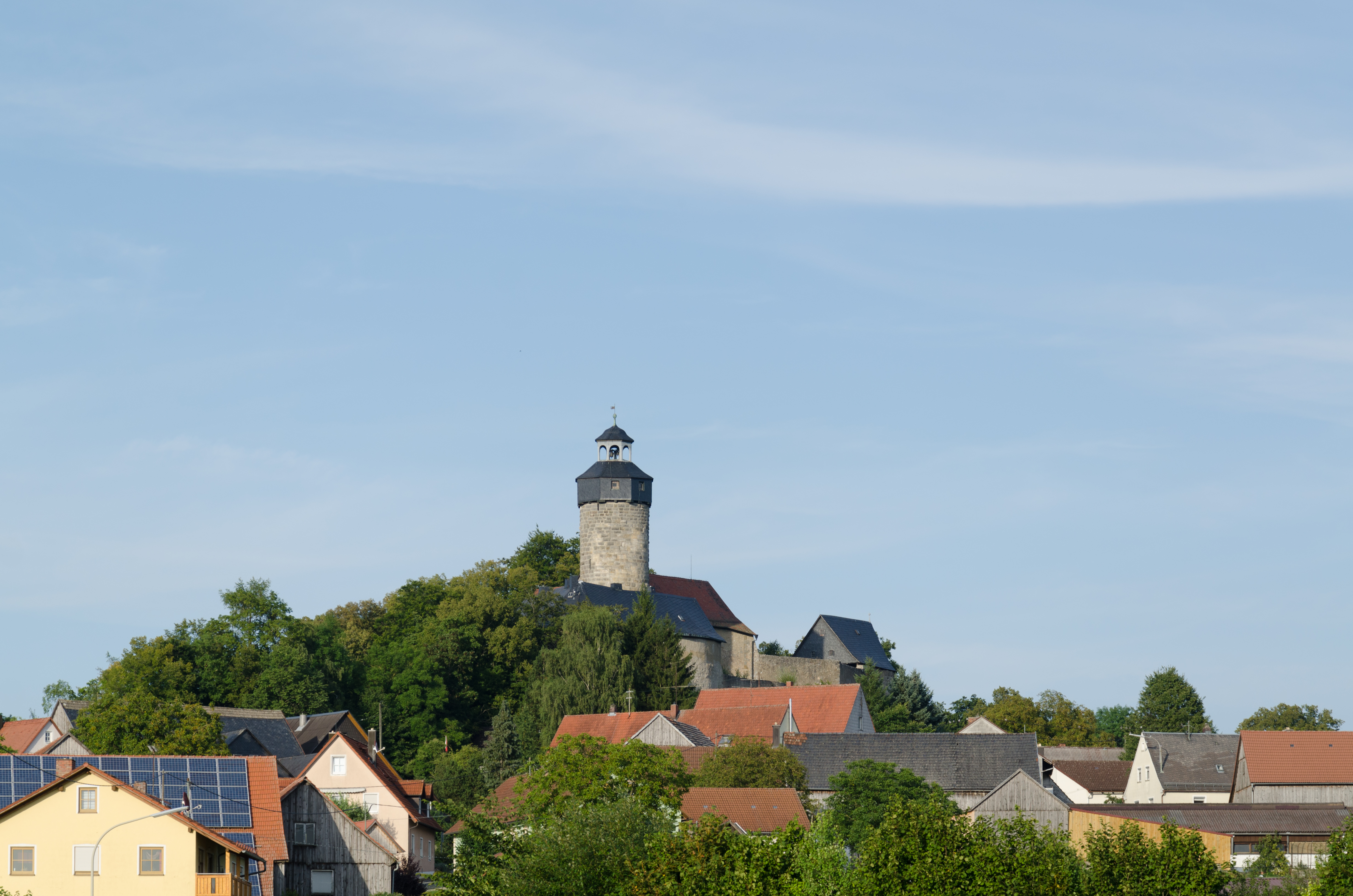 Wonsees, Sanspareil, Burg Zwernitz